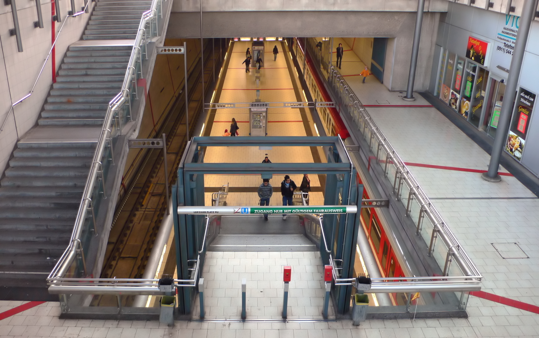 U-Bahnhof Nordostbahnhof der U-Bahn Nürnberg, Oberfläche, Blick von Norden in den Bahnhof